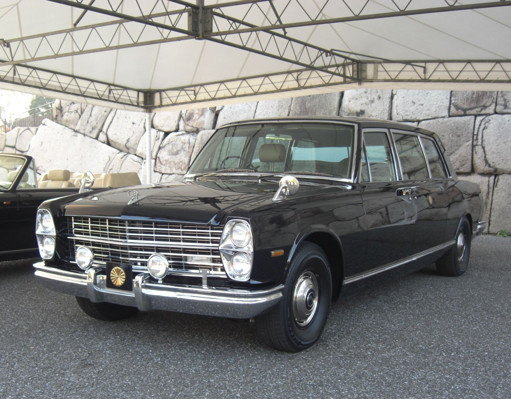 天皇陛下御即位20年記念特別展にて。